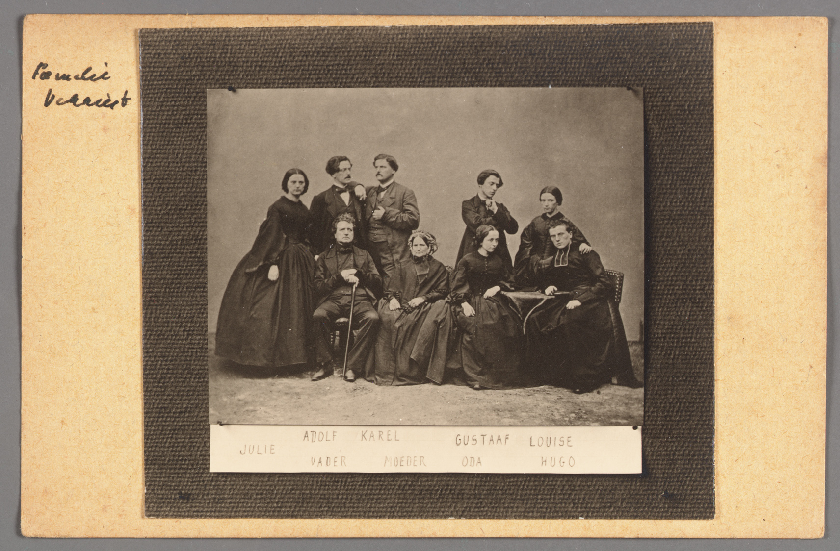 Foto van de familie Verriest - Deerlijk - België. Guido Gezellearchief, Openbare Bibliotheek Brugge, nr.8983 F